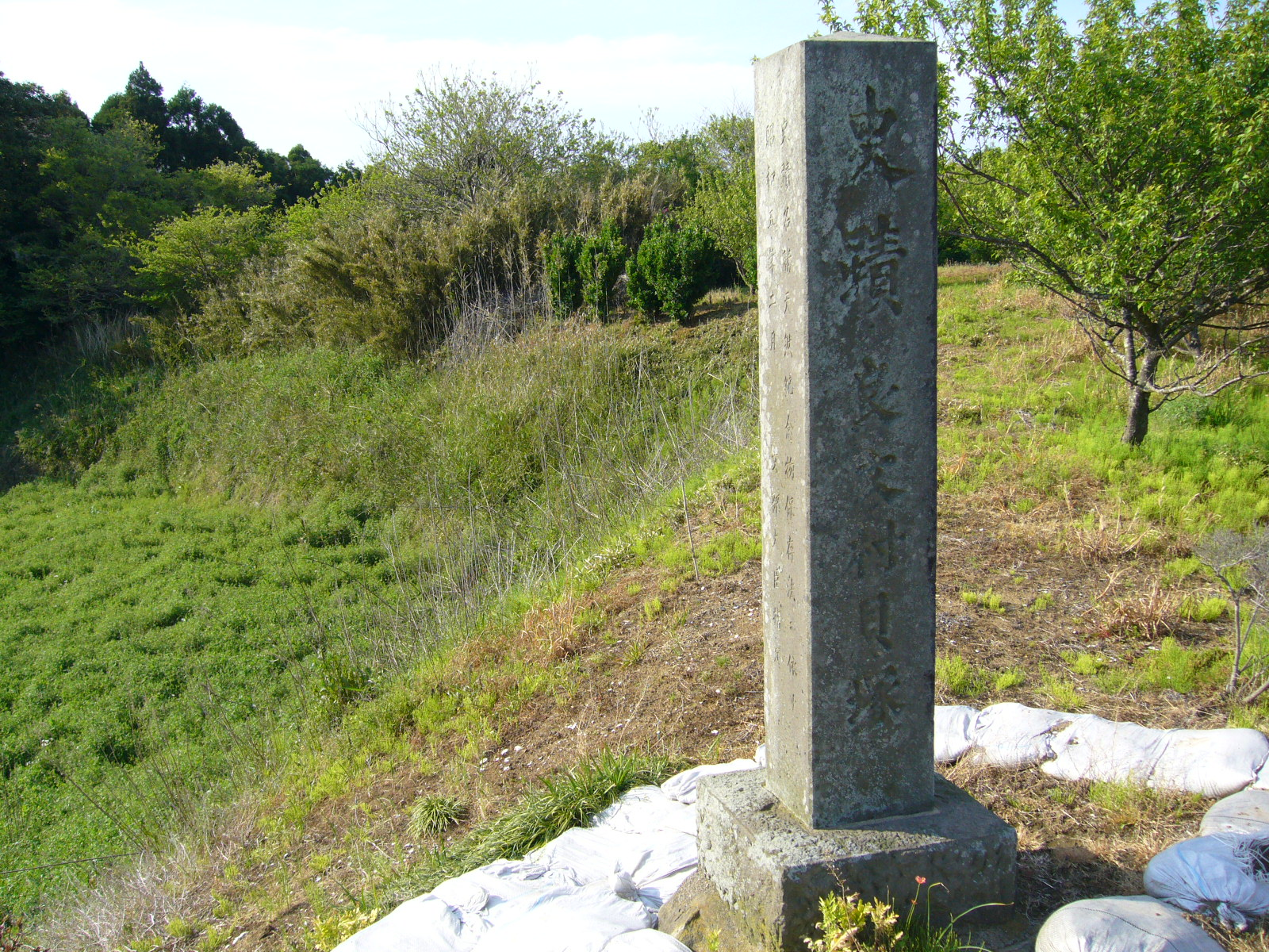 yoshibumi-shel-mound,katori-city,japan